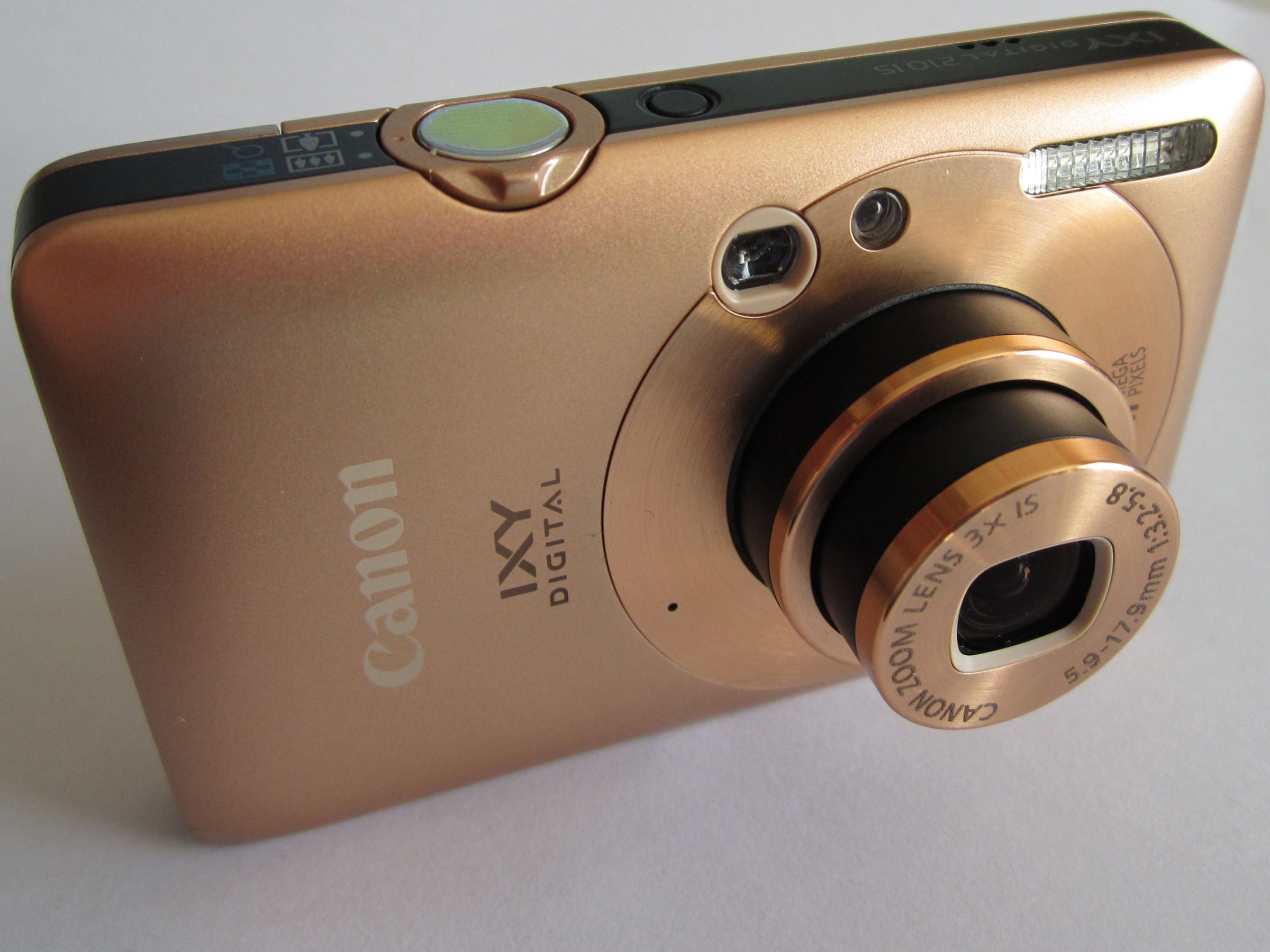 IXY DIGITAL 210IS(canon)